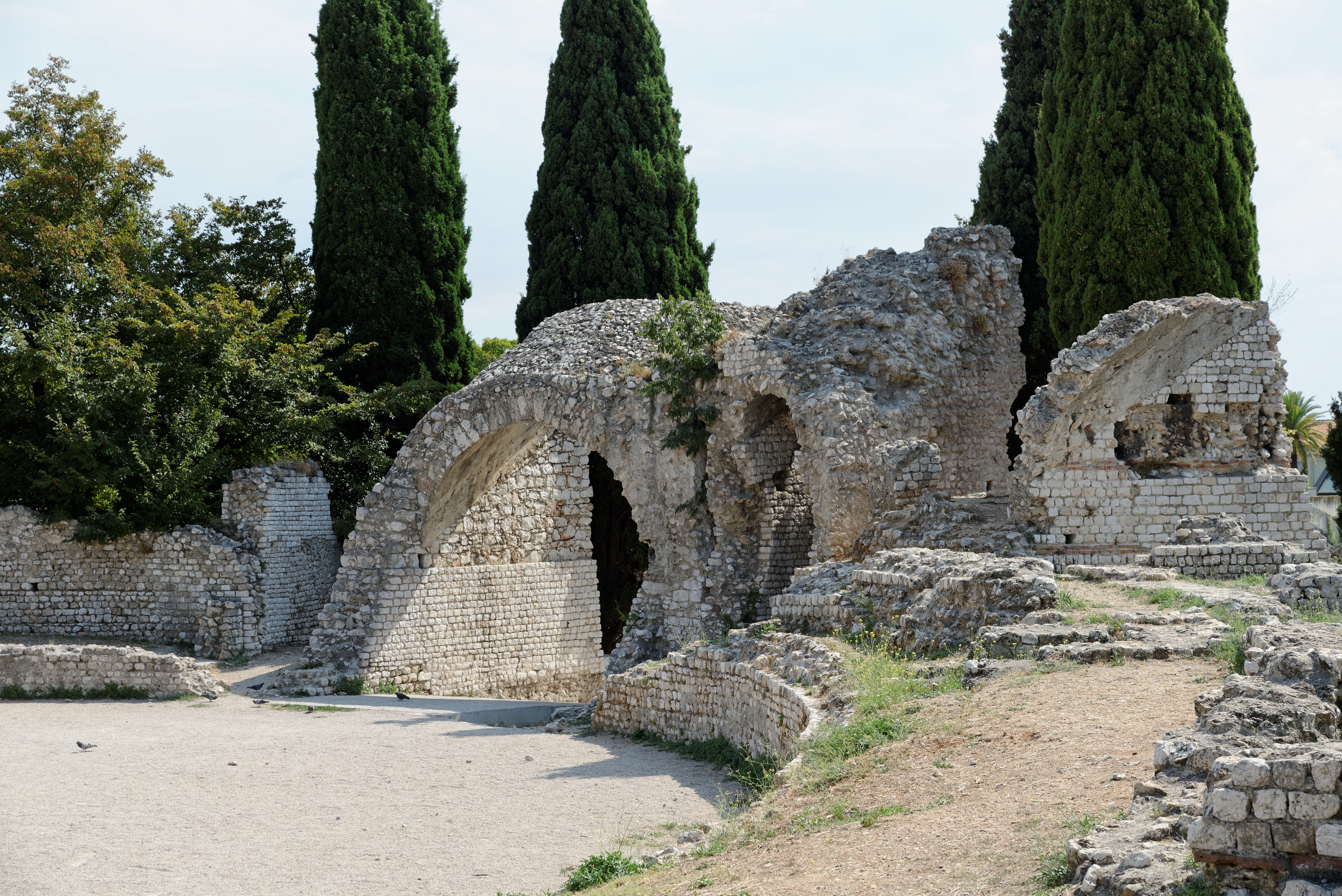 Arènes de Cimiez (Nice, Alpes maritime, France) .